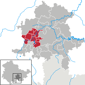 Verwaltungsgemeinschaft Mittleres Schwarzatal in Thuringia - District Saalfeld-Rudolstadt